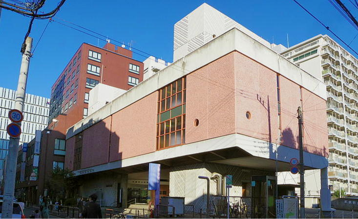 武蔵野公会堂